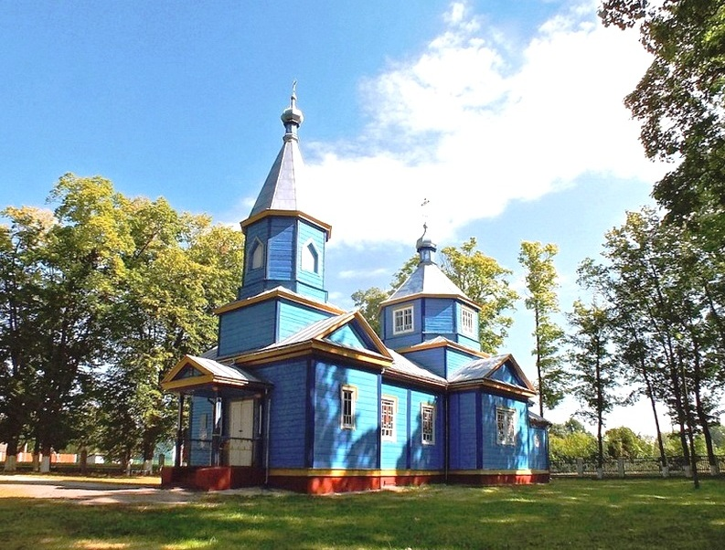 построена в 1883г.